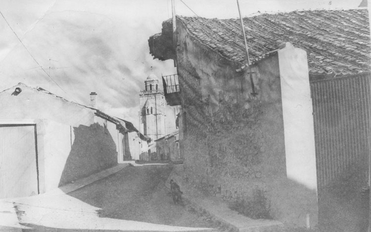 Iglesia. Torre - Ciguñuela (Valladolid) - Álbum 200 x 140 - Fotografía. Papel 110 x 45 B/N